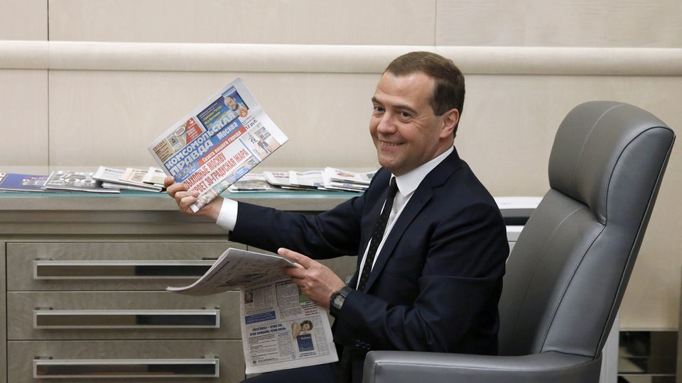 Председатель Правительства Российской Федерации Дмитрий Медведев в своём рабочем кабинете в Доме Правительства.